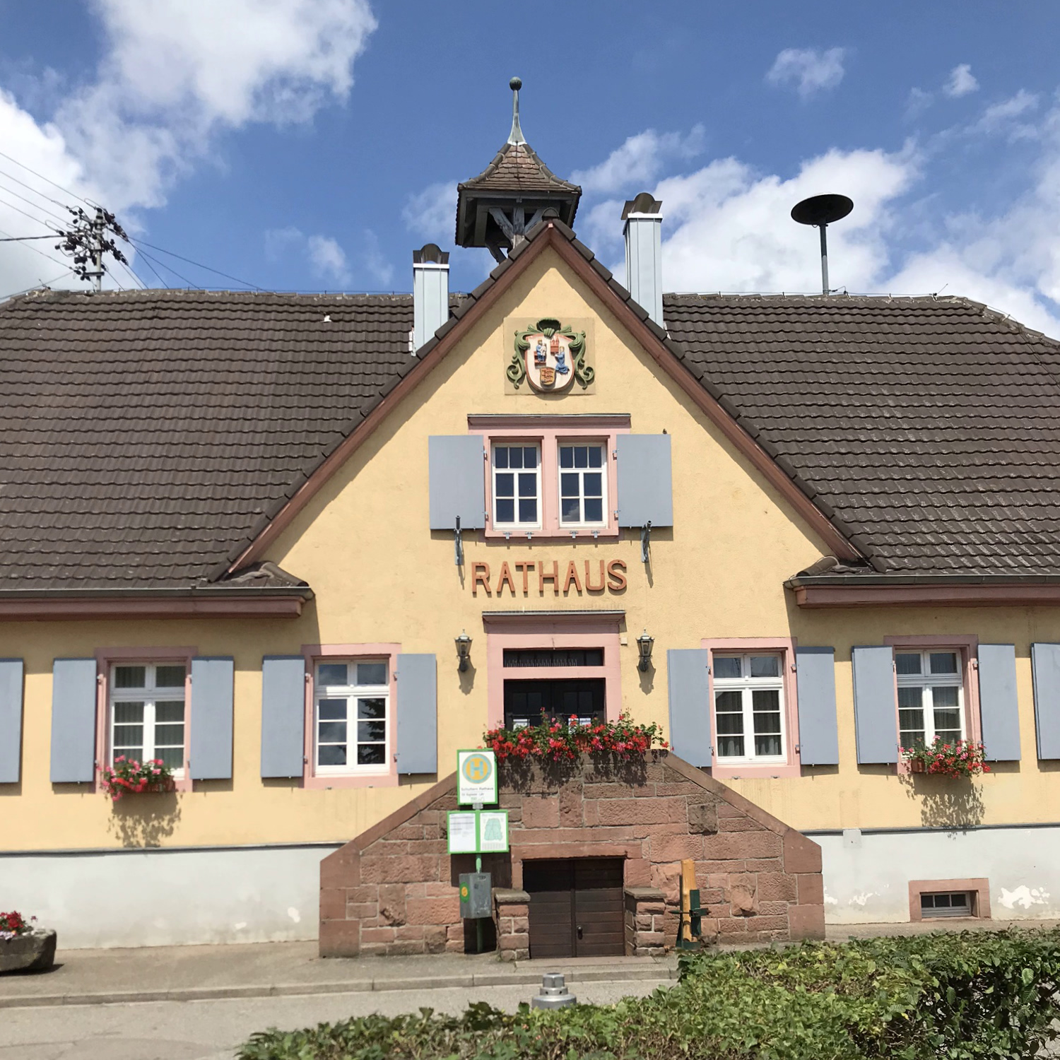 Das Rathaus in Schuttern